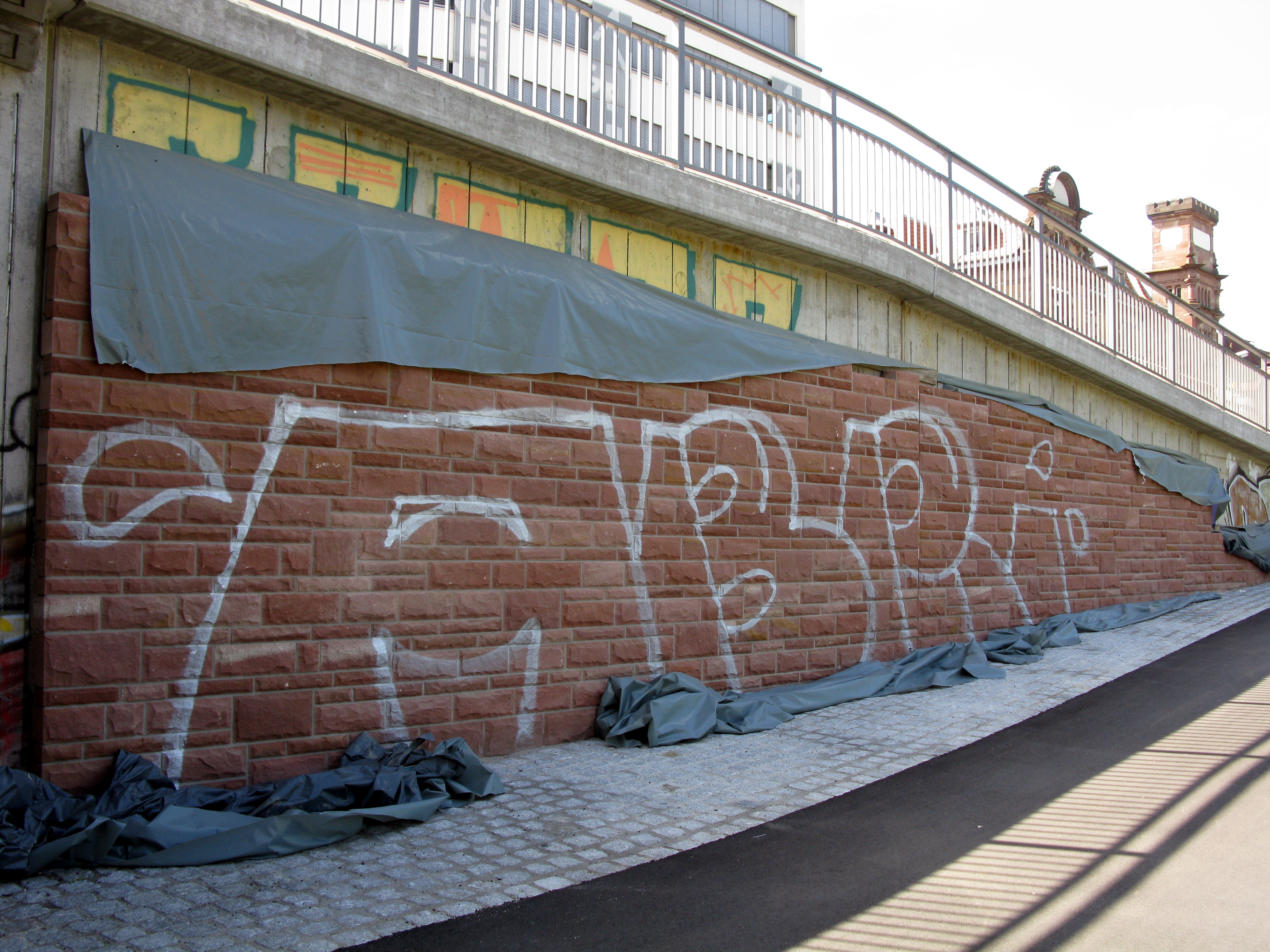 Neubau der Freiburger Kronenbrücke, Natursteinverkleidung mit Graffiti